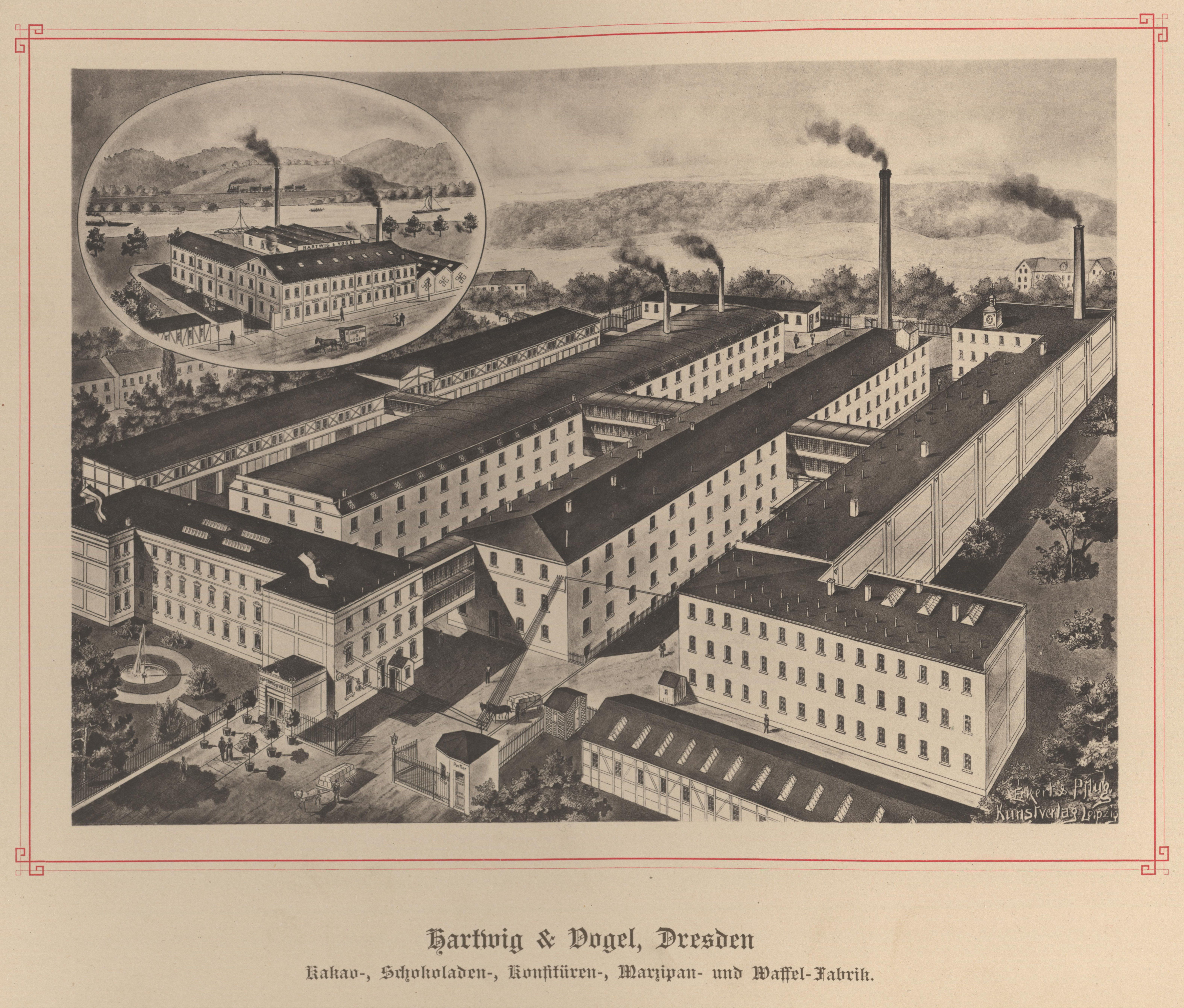 Hartwig & Vogel, Dresden und Bodenbach Kakao-, Schokoladen-, Konfekturen-, Marzipan- und Waffel-Fabriken aus: Die Groß-Industrie des Königreichs Sachsen in Wort und Bild Zweiter Teil Großes Bild: Schokoladenfabrik Hartwig & Vogel in Dresden-Altstadt, Einfahrt Freiberger Str. im Vordergrund Kleines Bild: Niederlassung in Bodenbach (Podmokly), OT Rosawitz (Rozbělesy) an der Elbe.